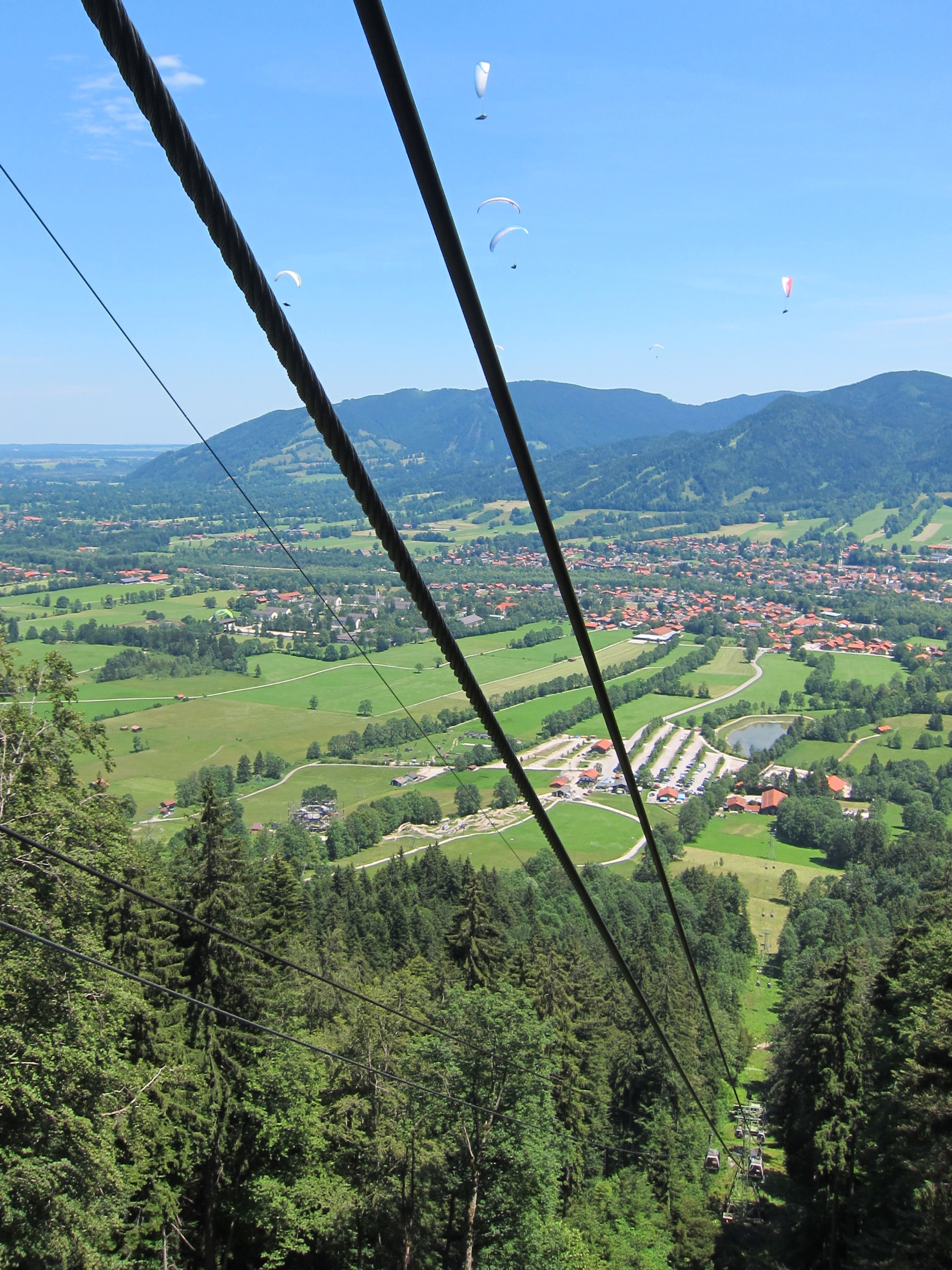 Brauneck-Bergbahn: Blick ins Tal und auf fünf Gleitschirmflieger